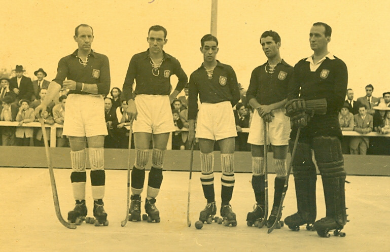 No dia 26 de julho de 1952, pelas 20 horas, houve exibição dos Campeões do Mundo de Hóquei em Patins, defrontando-se a seleção A com a seleção B, em que aquela venceu por 6-0. Seleção A: Emídio Pinto, Raio, José Dias, Correia dos Santos e Cruzeiro.